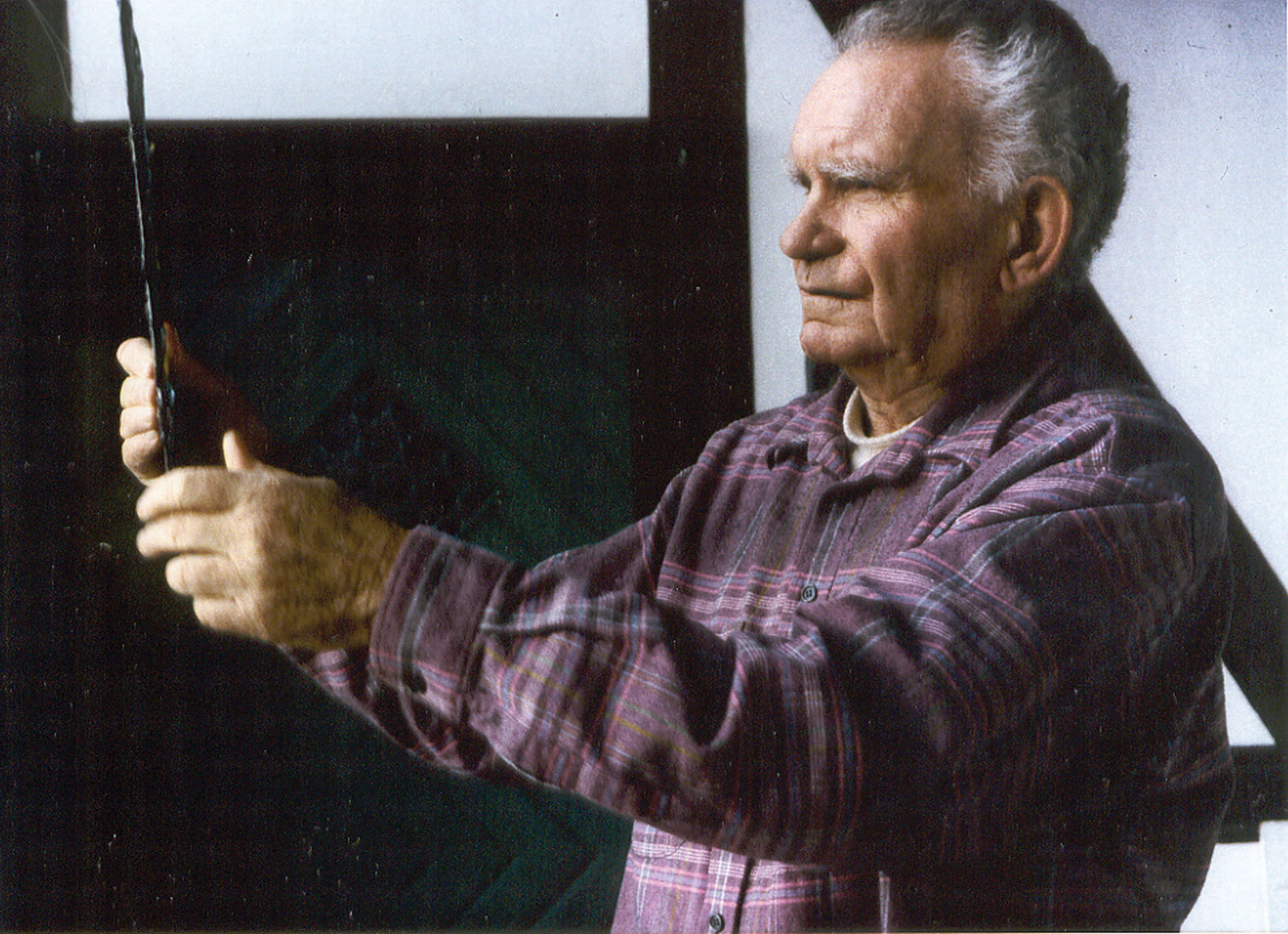 Helmut Nitzsche in seinem Atelier